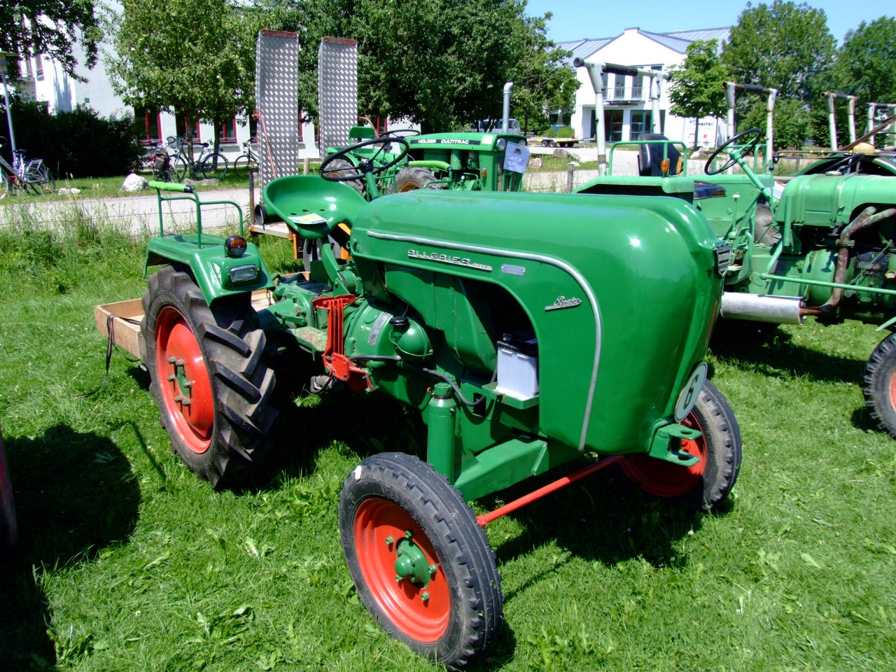 Allgaier Porsche AP16, Baujahr 1955, Hubraum: 1374 ccm, Reifengröße 8-24, Leergewicht: 1310 kg, zul. Gesamtgewicht: 1600 kg, zul. Achsdruck vorn: 600 kg, zul. Achsdruck hinten: 1000 kg